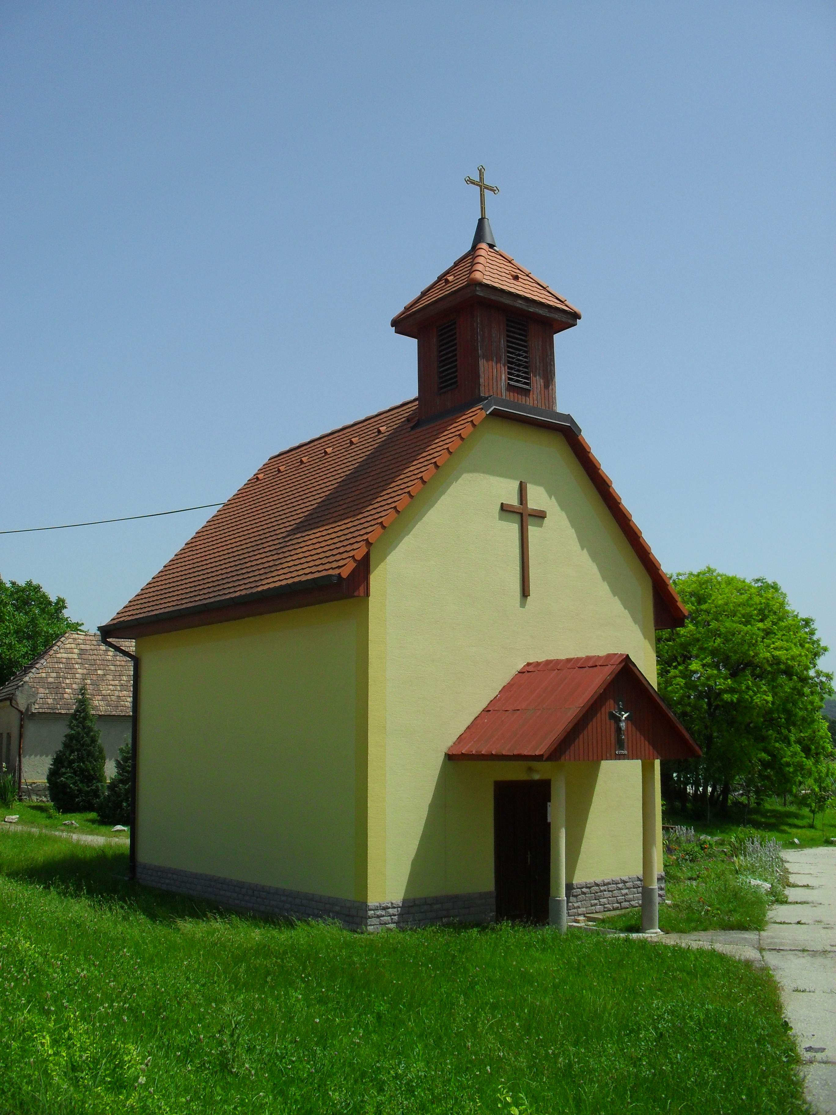 Pat - katolikus templom